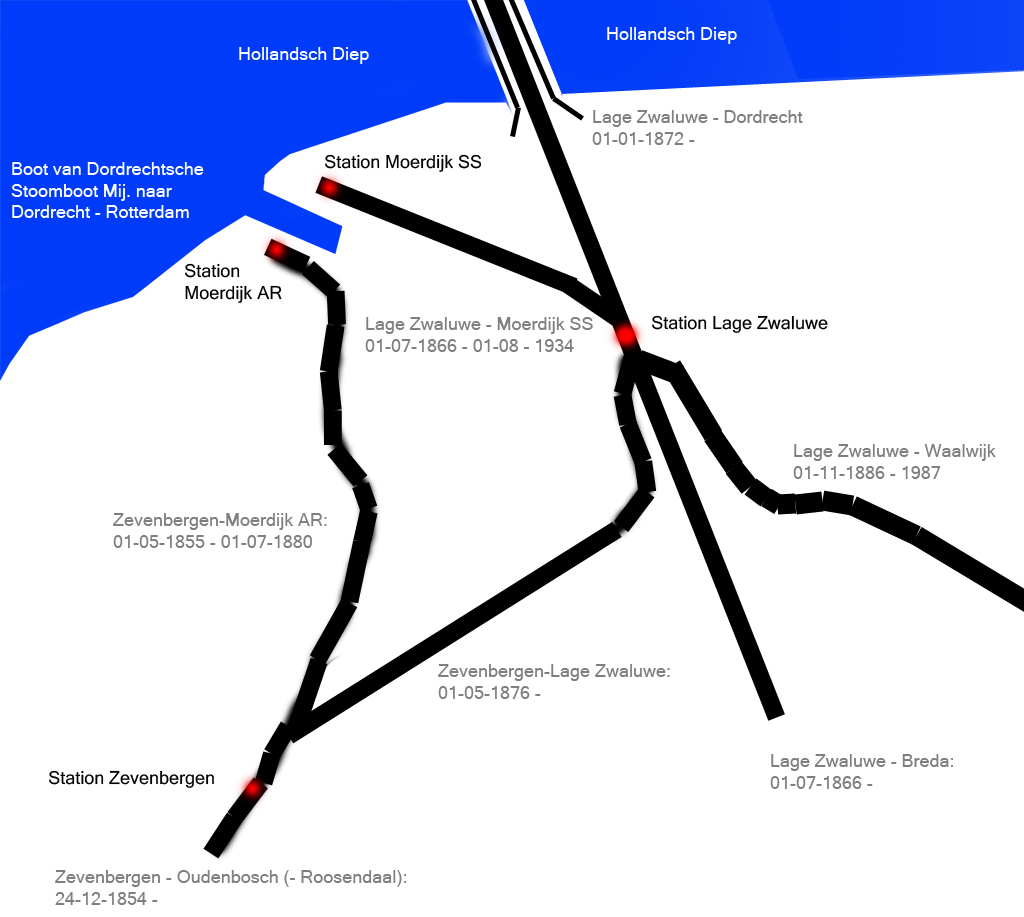 Situatie spoorlijnen Moerdijk